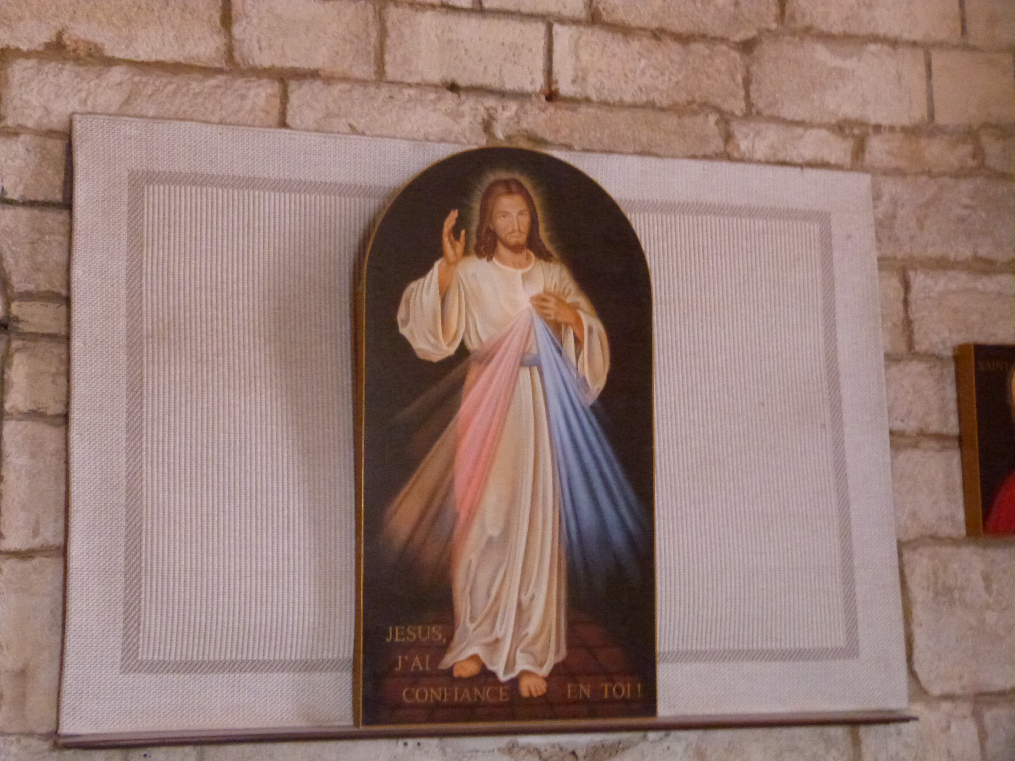 Icône exposée dans la chapelle Saint-Blaise et représentant le Christ Victorieux inspirée d'une vision de sainte Faustine. Cette chapelle est également appelée chapelle de la Divine Miséricorde. (Rocamadour, Lot)